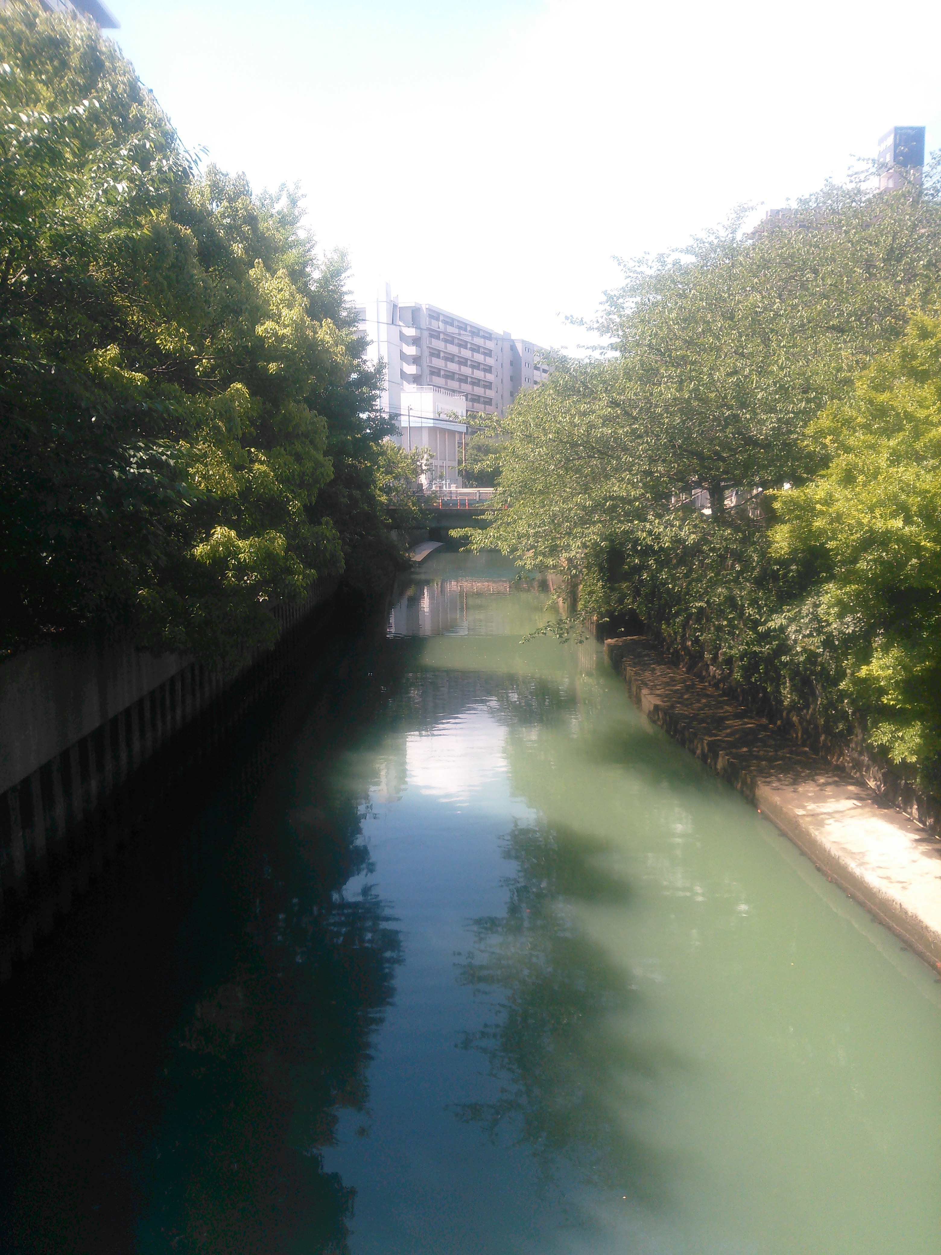 横浜市西区、石崎川